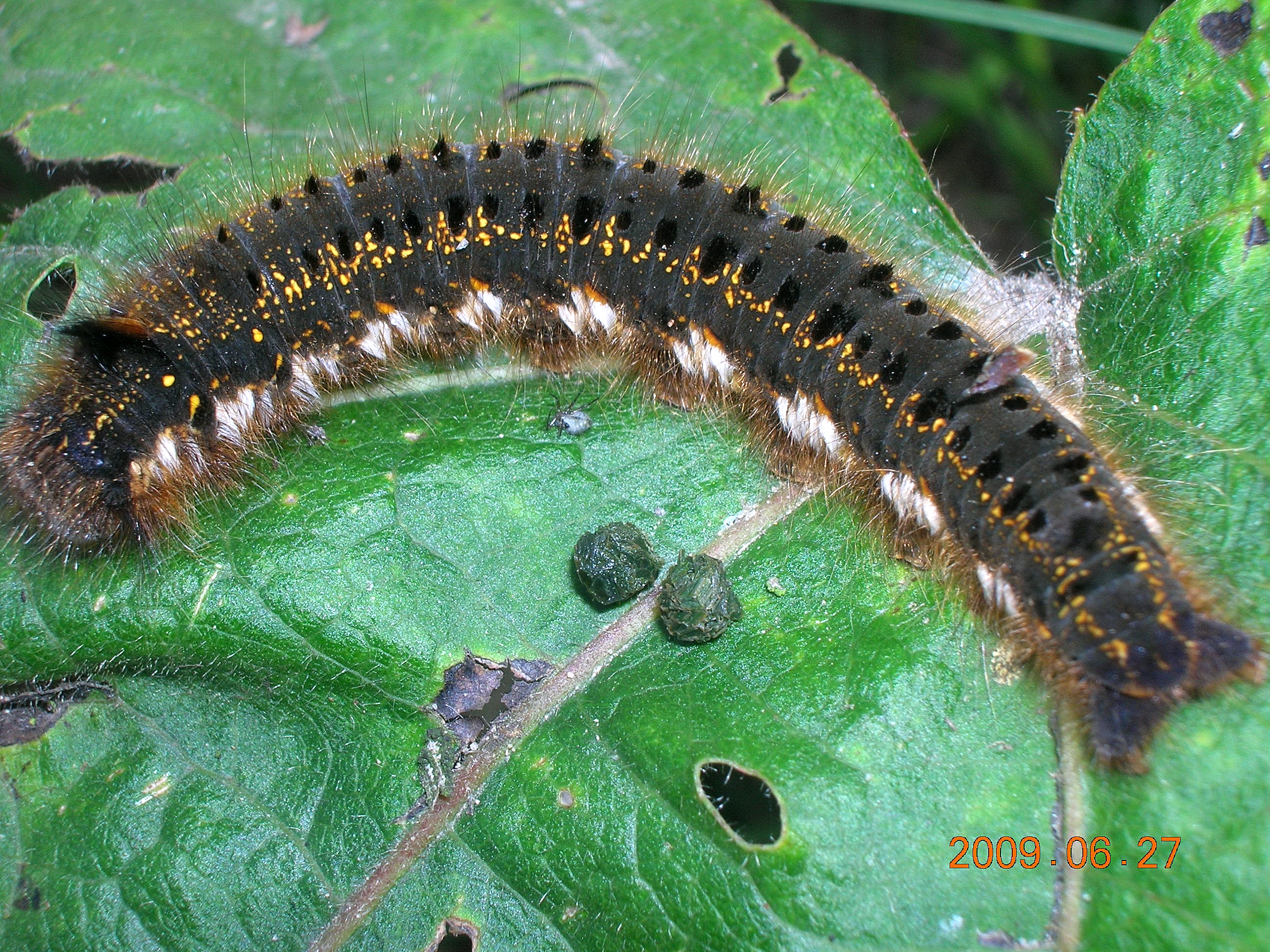 Barczatka napójka, napójka łąkówka (Euthrix potatoria) - larwa